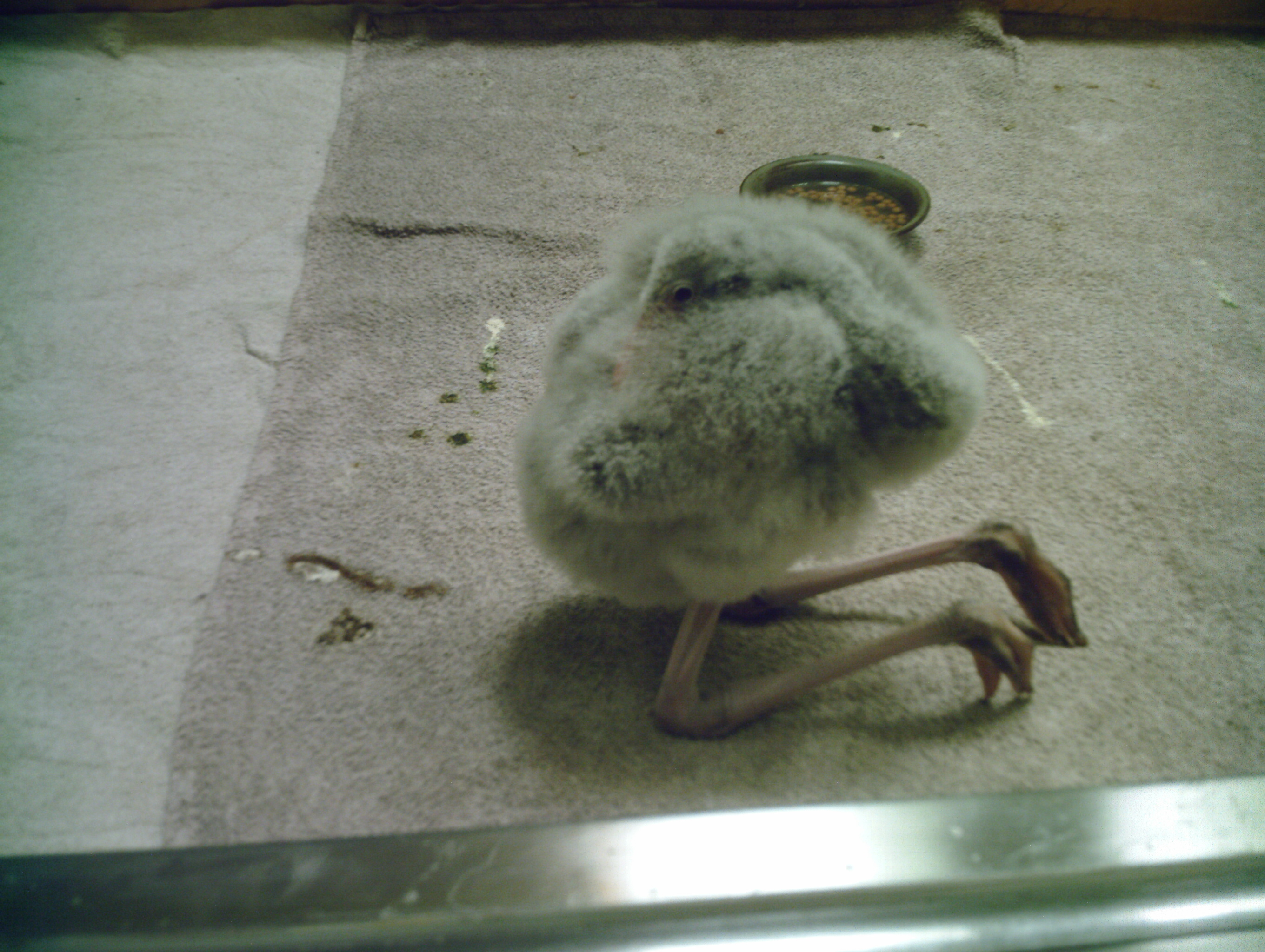 Un petit flamant de Cuba né le 17 juillet 2010 (quatre semaines sur la photo) de la nurserie du Parc des oiseaux de Villars-les-Dombes (Ain, France)